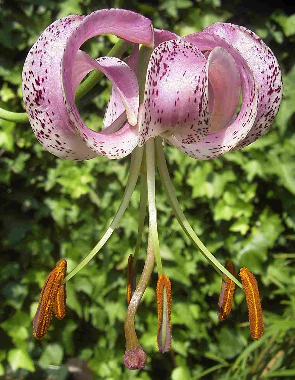 Flora Lilium lankongense